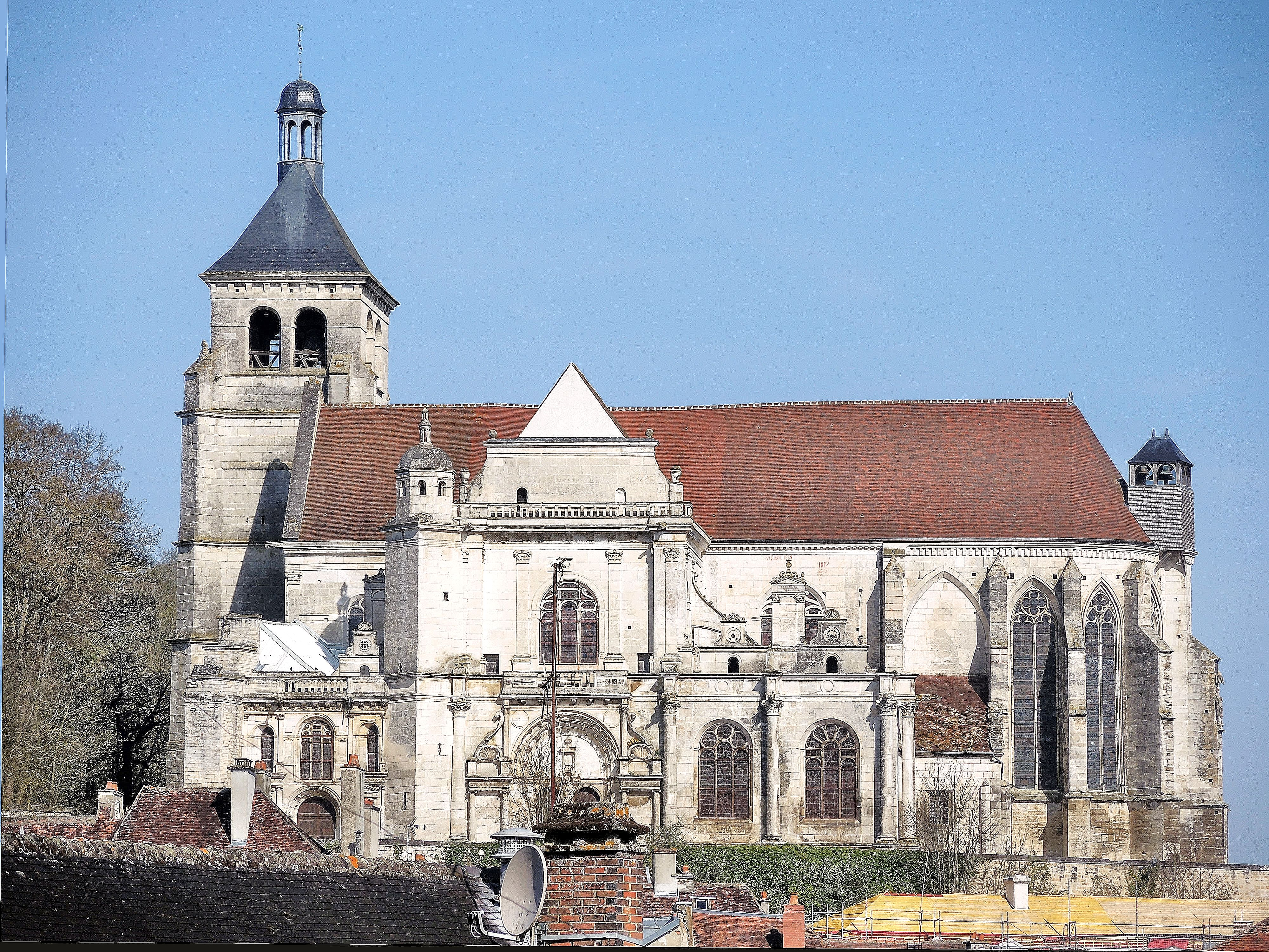 Tonnerre. Eglise Saint Pierre.